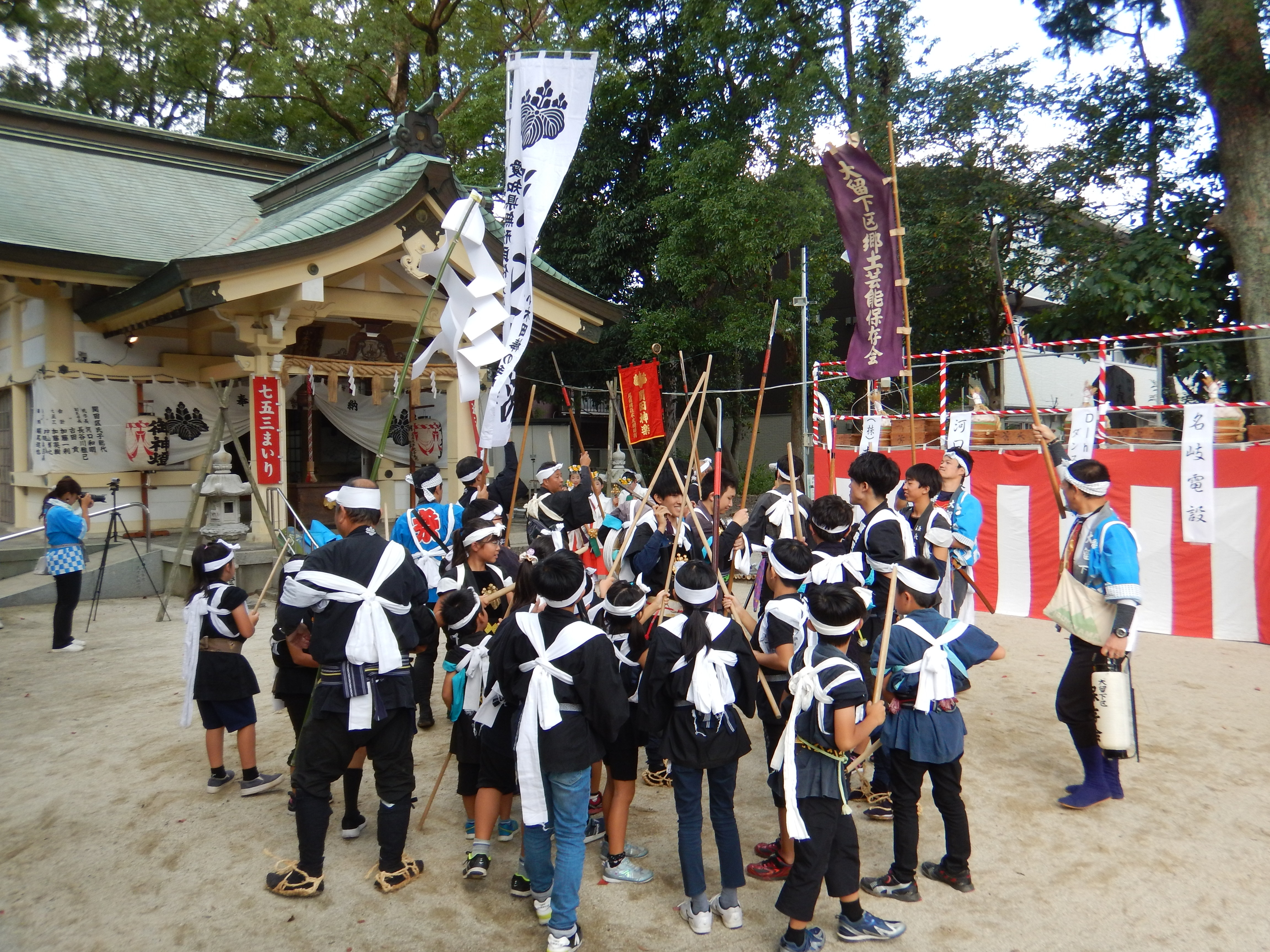 小木田の棒の手の儀式の棒合わせの様子